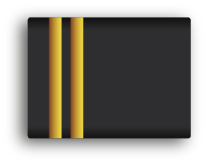 Rangen van de Nederlandse politie, epauletten (schuifpassanten) t.b.v. het huidige en het nieuwe (na 2014) uniform.